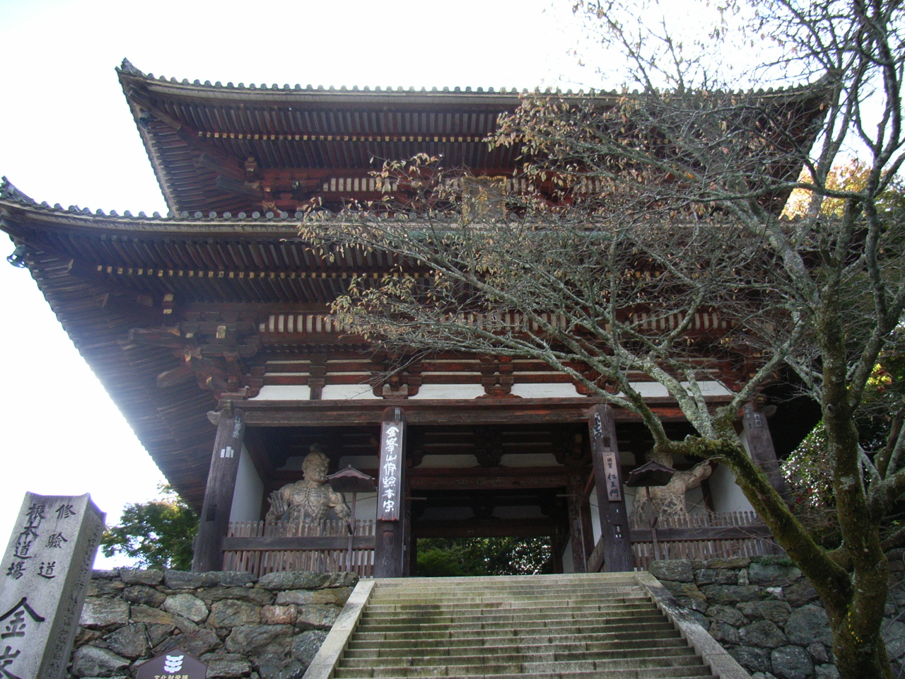 Ёсино - храм Кимпусэн-дзи Ёсино, Нара - храм Кимпусэн-дзи, ворота храма